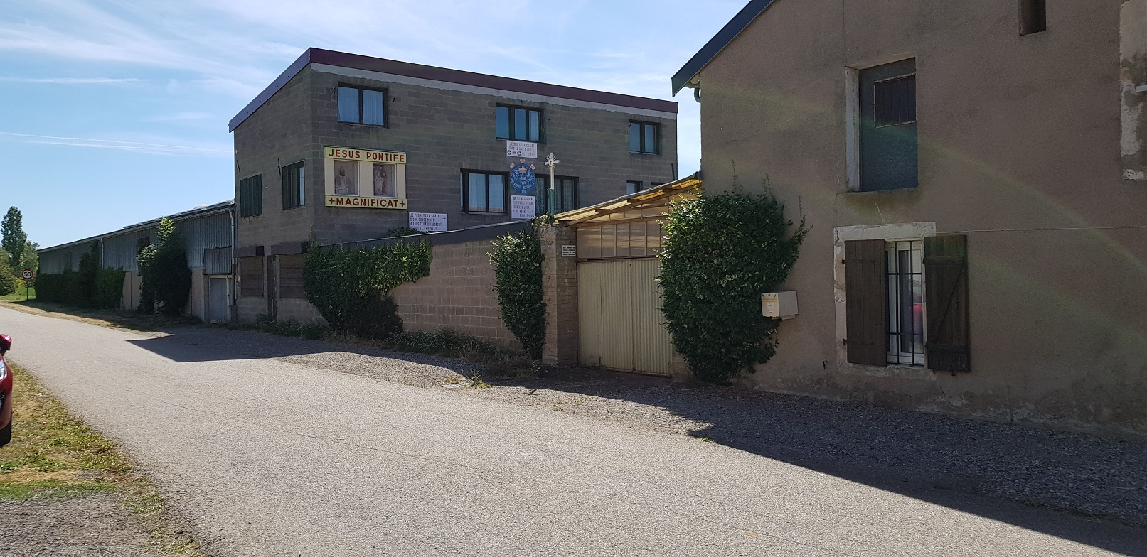 Vue du "petit Vatican" de Clément XV - Clémery - Meurthe-et-Moselle - France